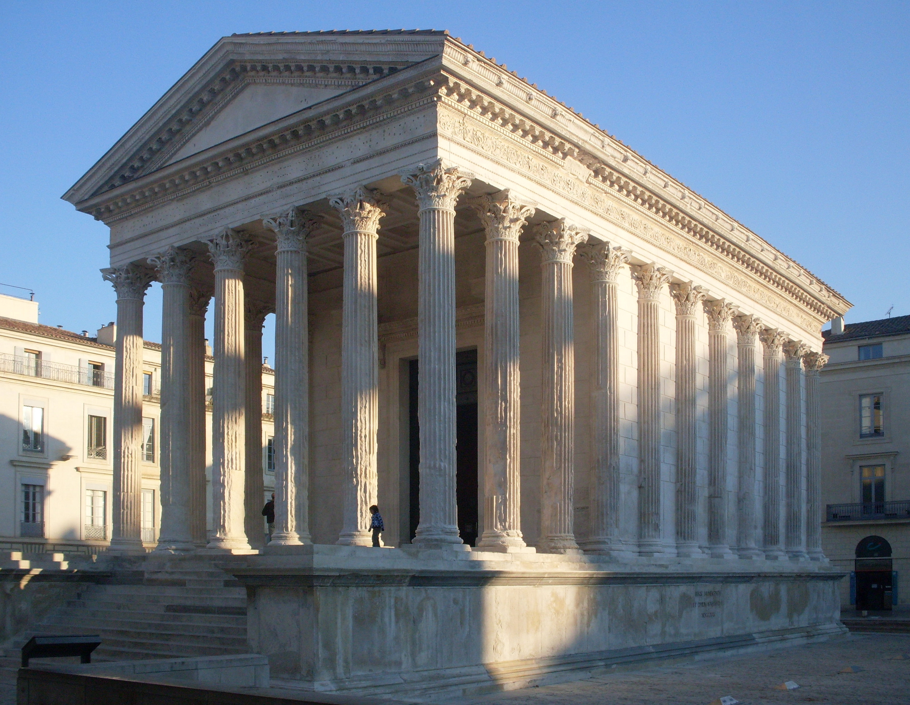 photo de la maison carrée de Nîmes en janvier 2011